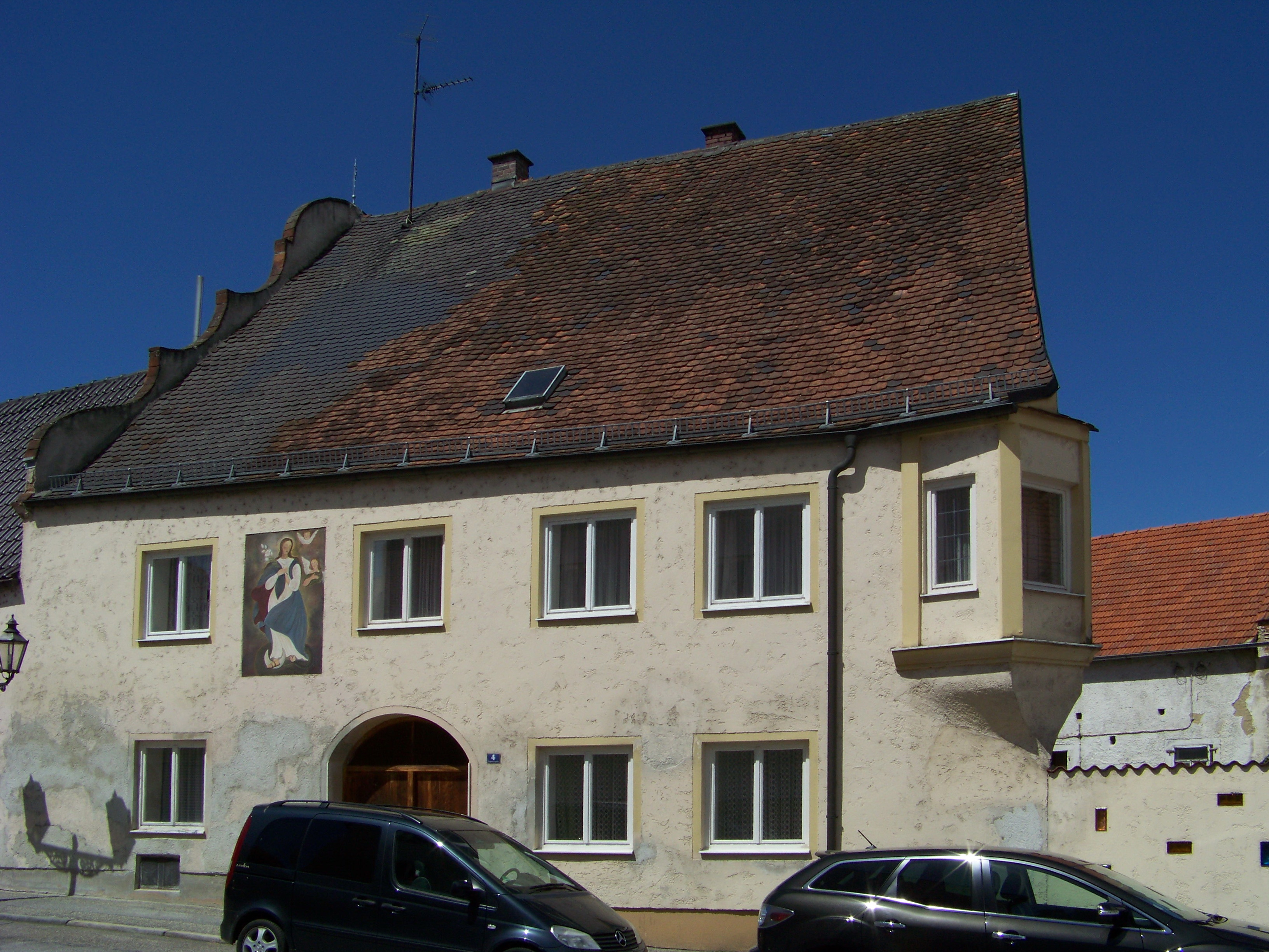 Geiselhöring, Regensburger Str. 4. Wohnhaus. Zweigeschossiger und traufständiger Massivbau mit steilem Satteldach, gewölbter Durchfahrt, Eckerker und einem Schweifgiebel, im Kern 17./18. Jahrhundert.